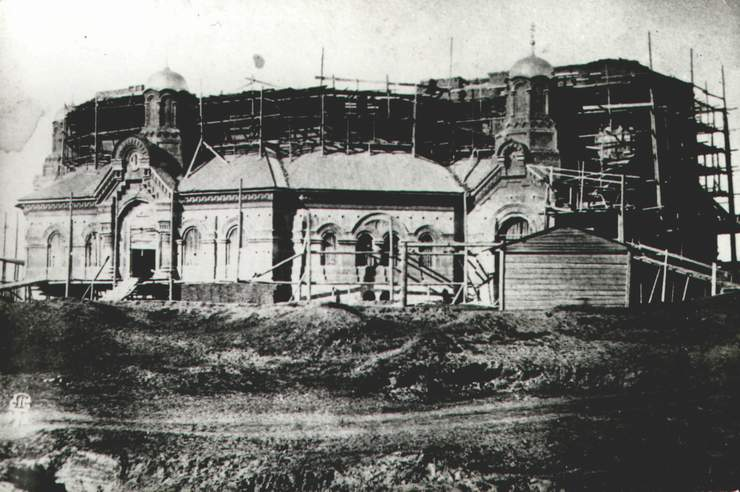 Самара. Строительство Кафедрального собора. Фотография. ~1870-е годы.